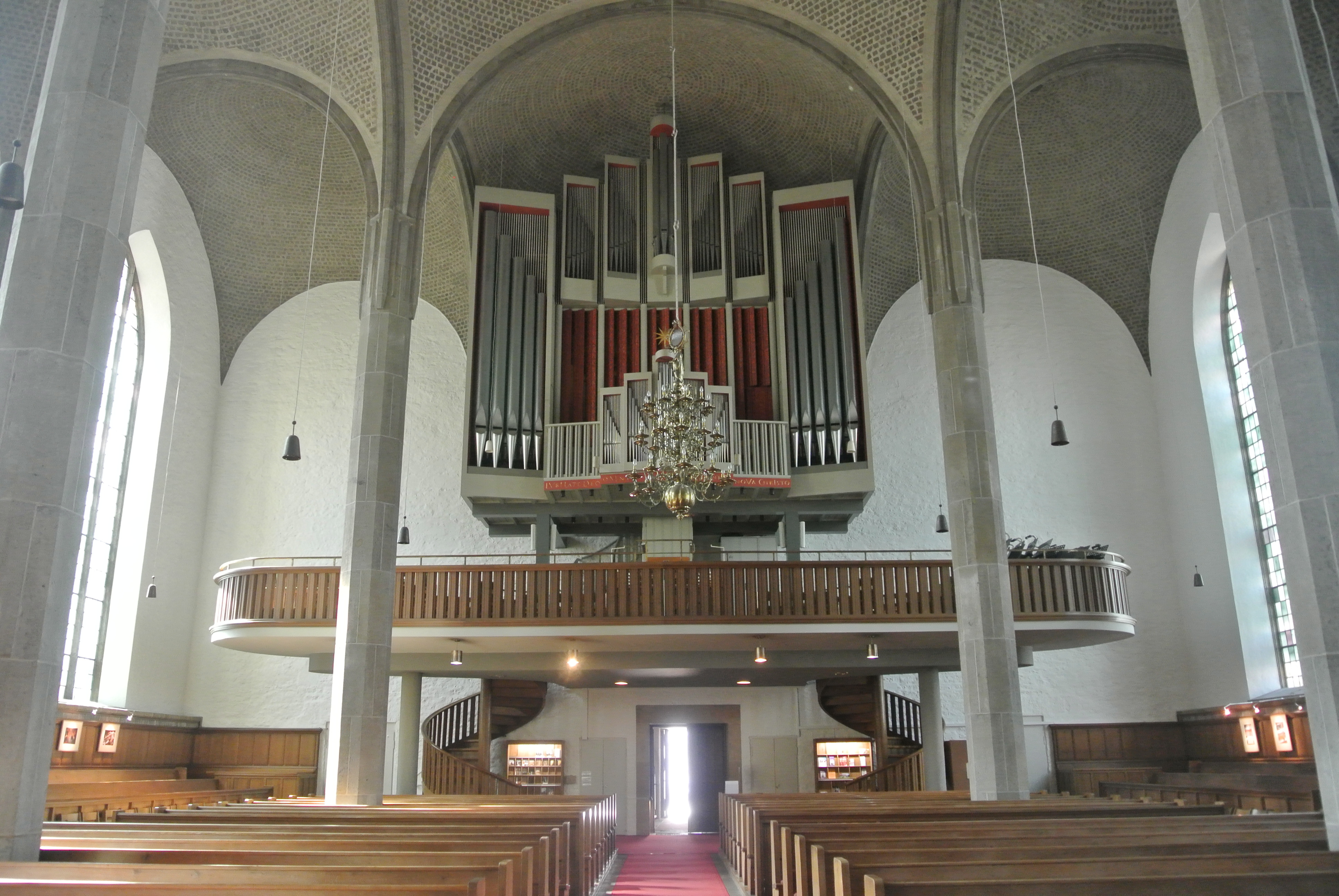 Nicolaikirche Bielefeld Orgel